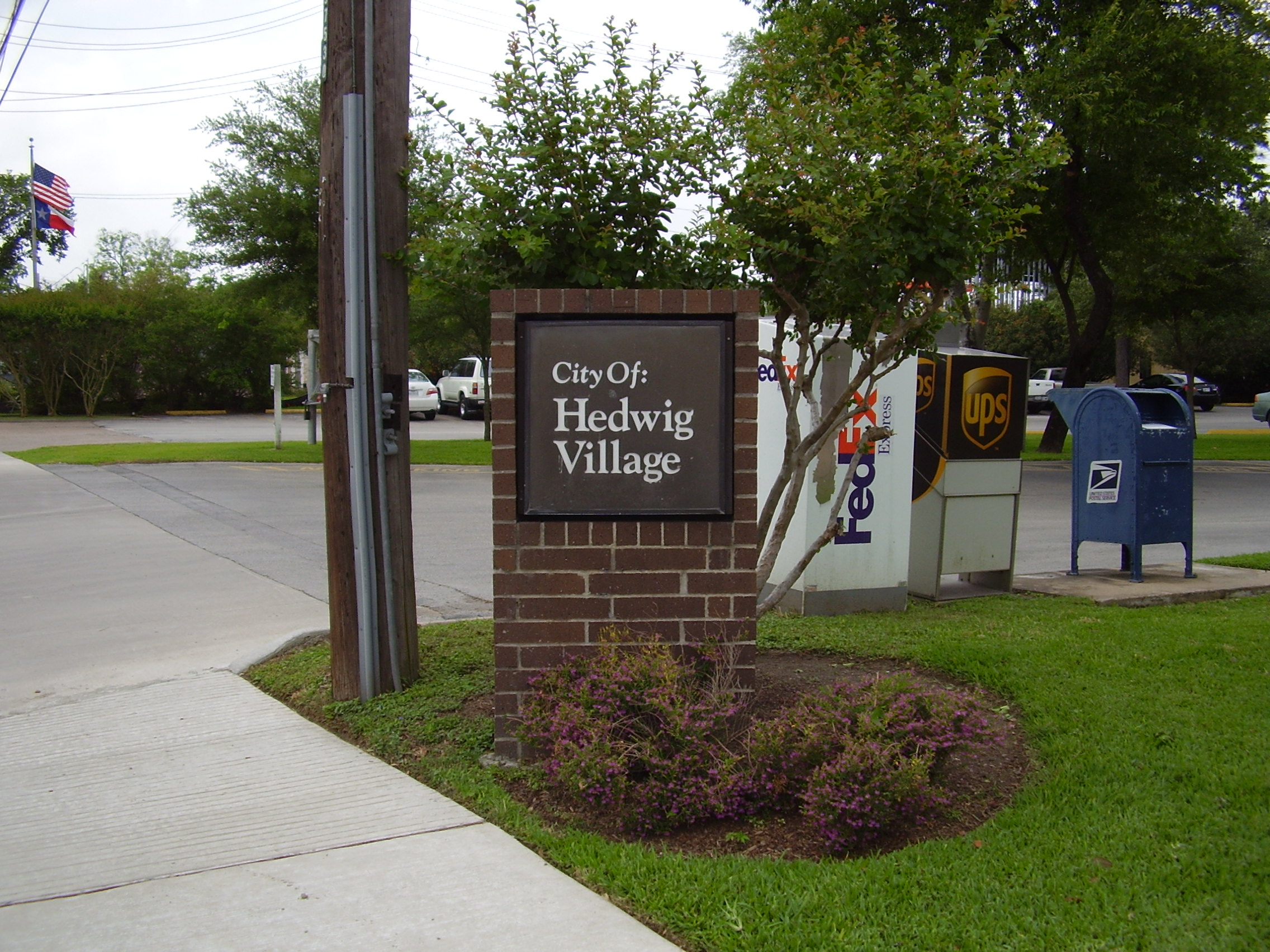 Marker of Hedwig Village, Texas